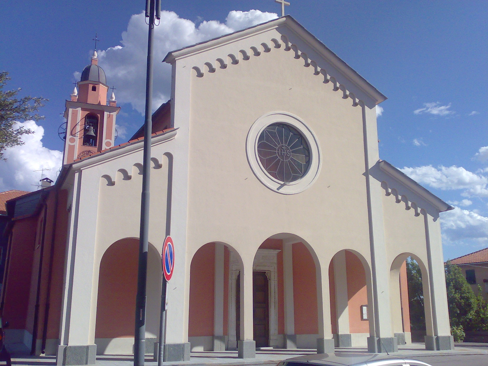 Facciata e campanile della chiesa di San Bernardi in Stella SV (Italy)